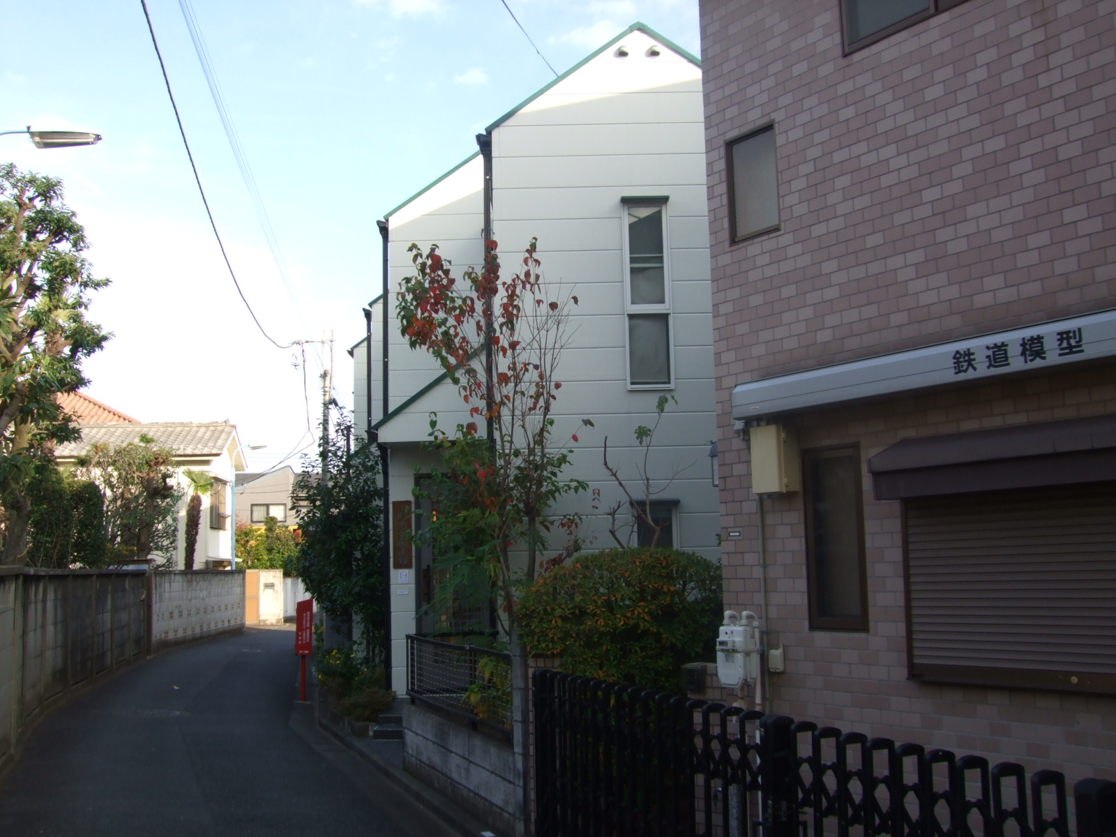 東京都杉並区にある小野忠重版画館。